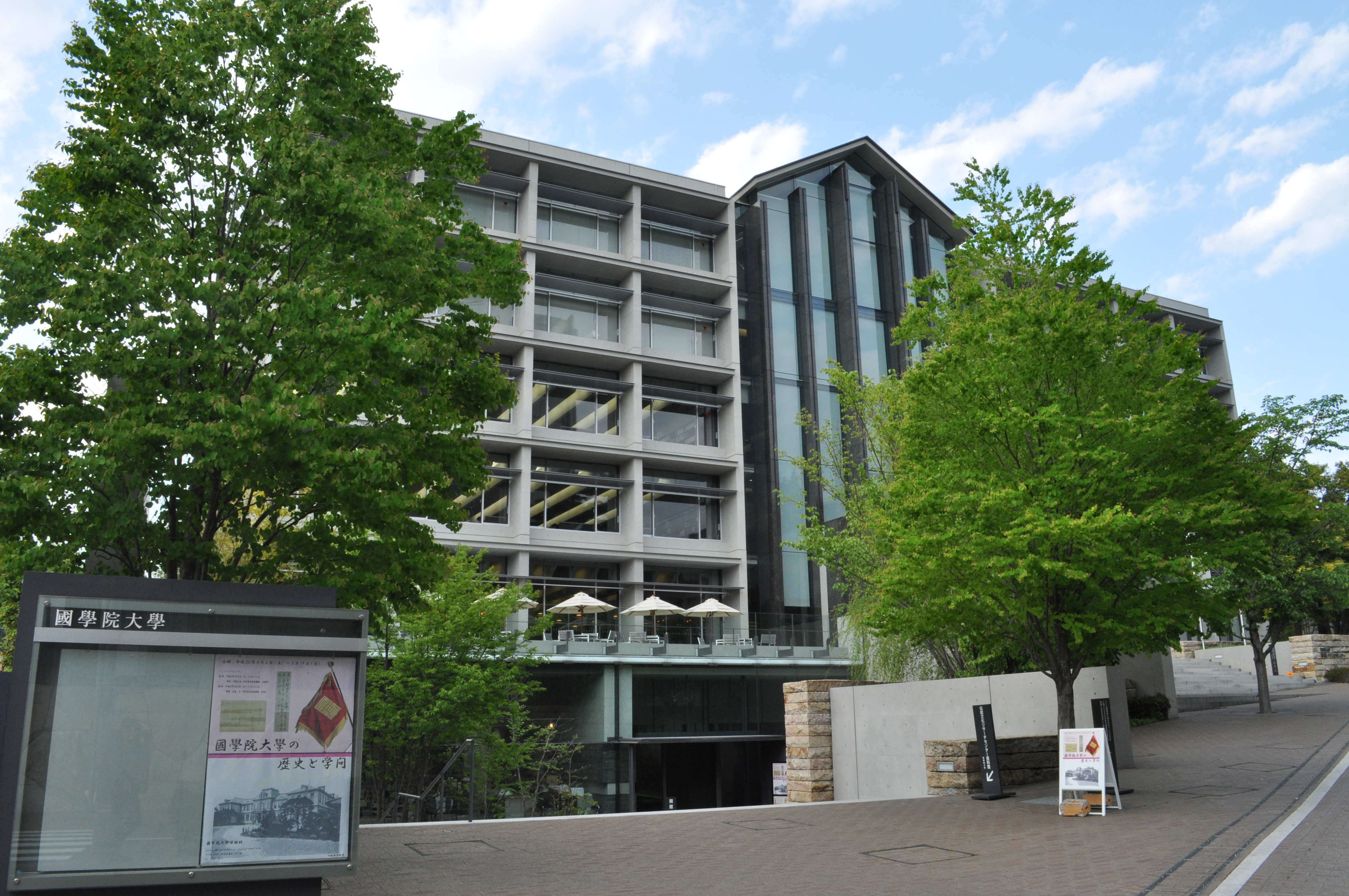 國學院大學渋谷キャンパスの学術メディアセンター（AMC）。國學院大學図書館や國學院大學博物館が入る。写真中央は國學院大學博物館の前身である伝統文化リサーチセンター資料館。